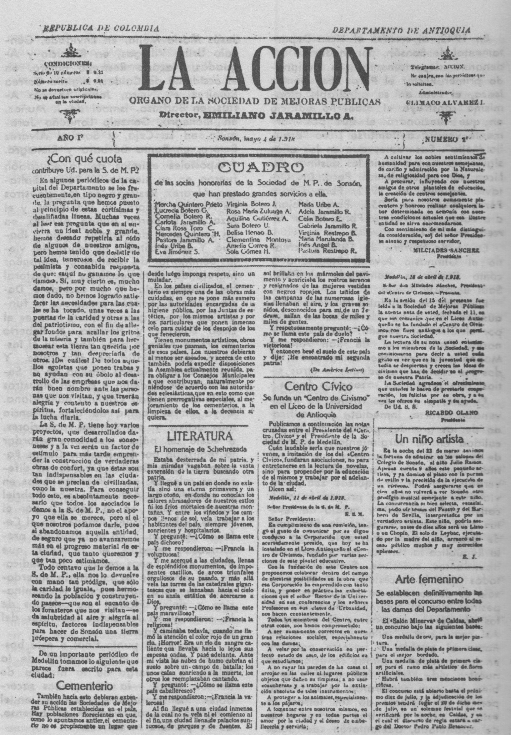 Primera tirada del periódico La Acción, de Sonsón, el viernes 4 de mayo de 1918